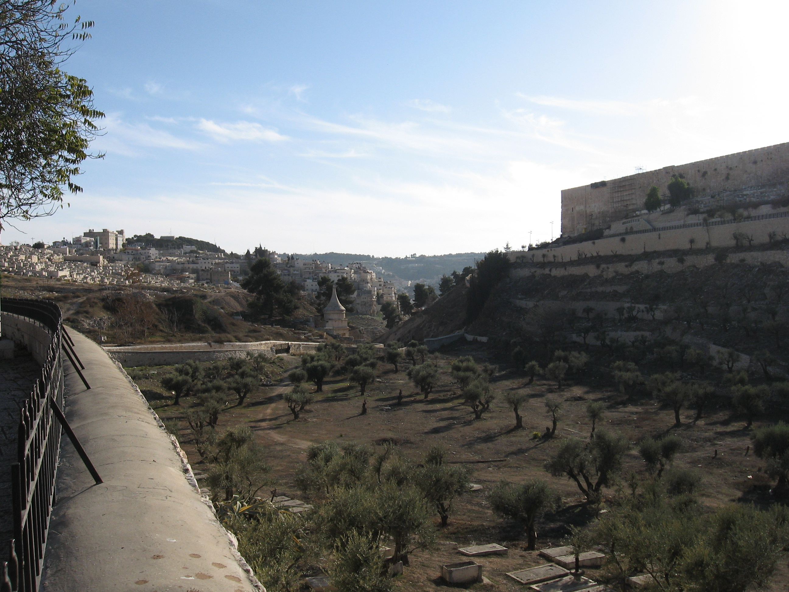 Das Kidrontal vom Löwentor aus gesehen